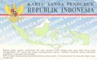 KTP untuk Warga Negara Indonesia